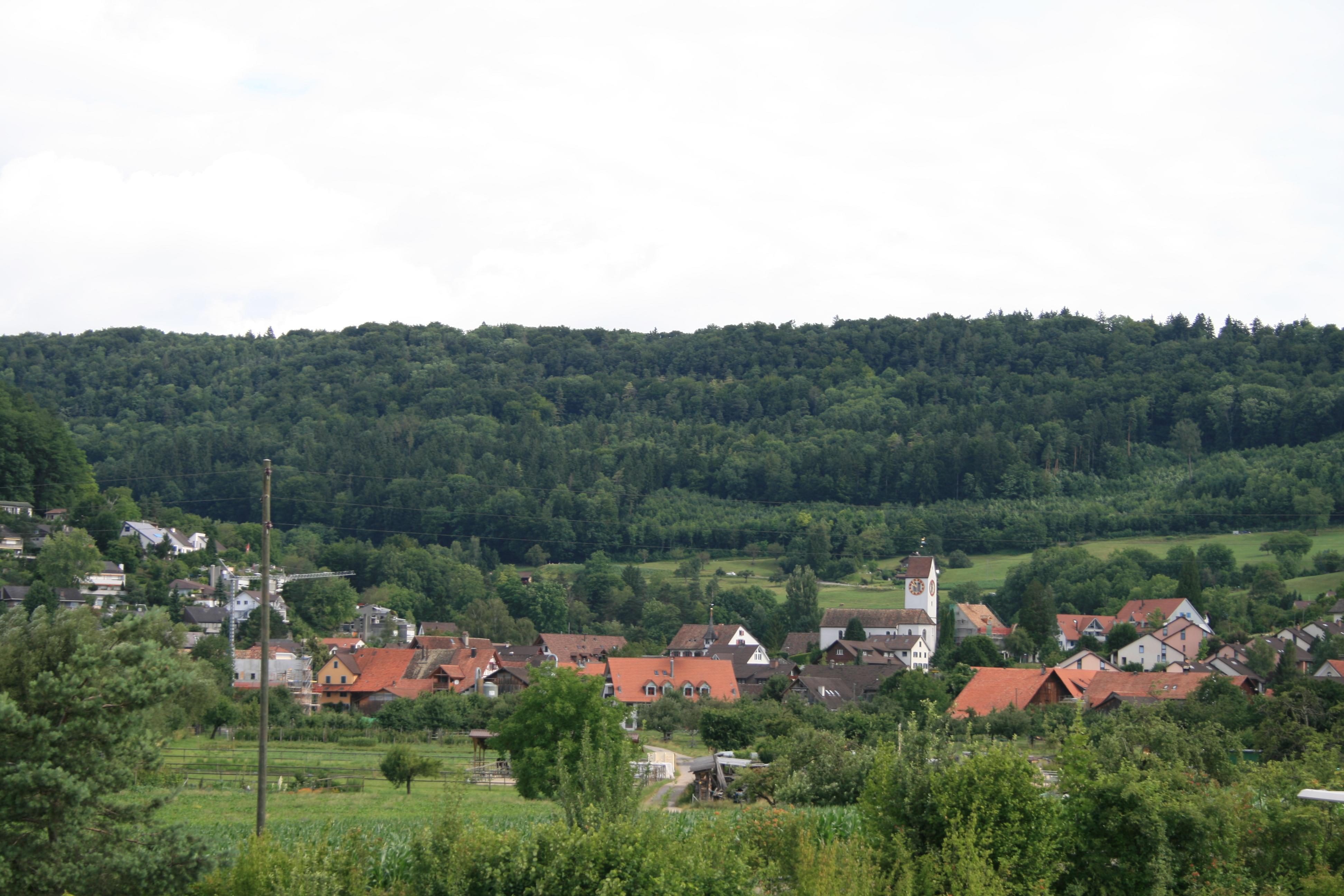 Blick auf Weiningen ZH